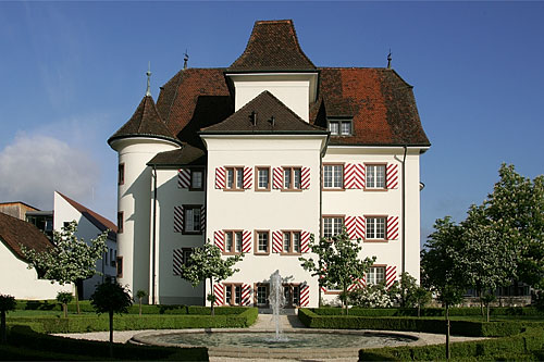 von Blarer-Schloss in Aesch